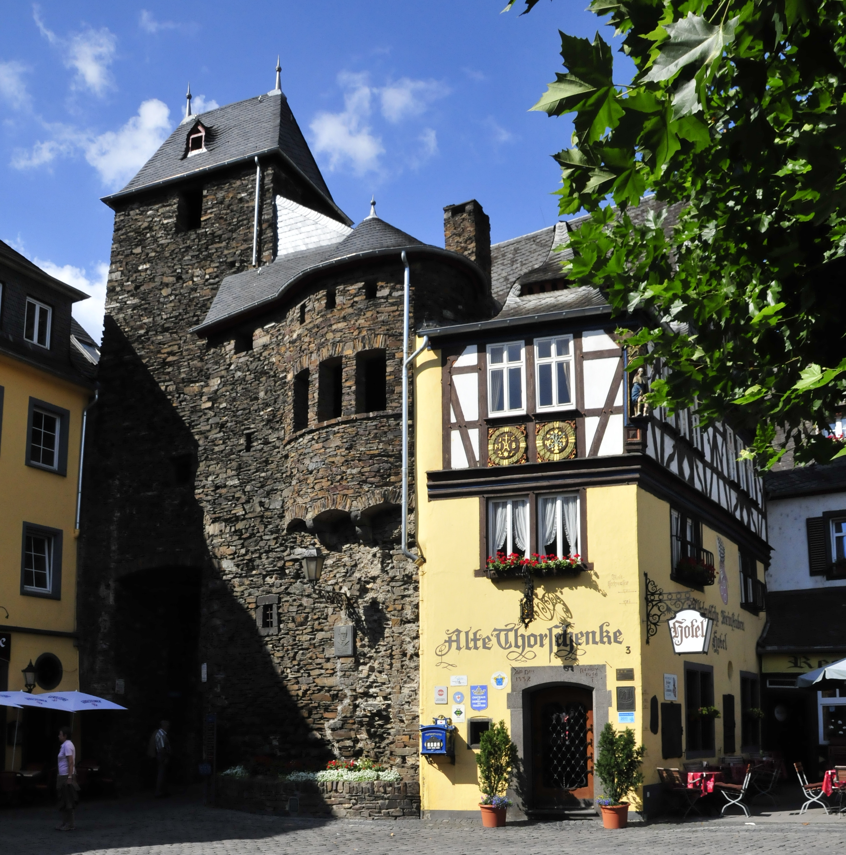 Cochem, Enderttor und Torschenke